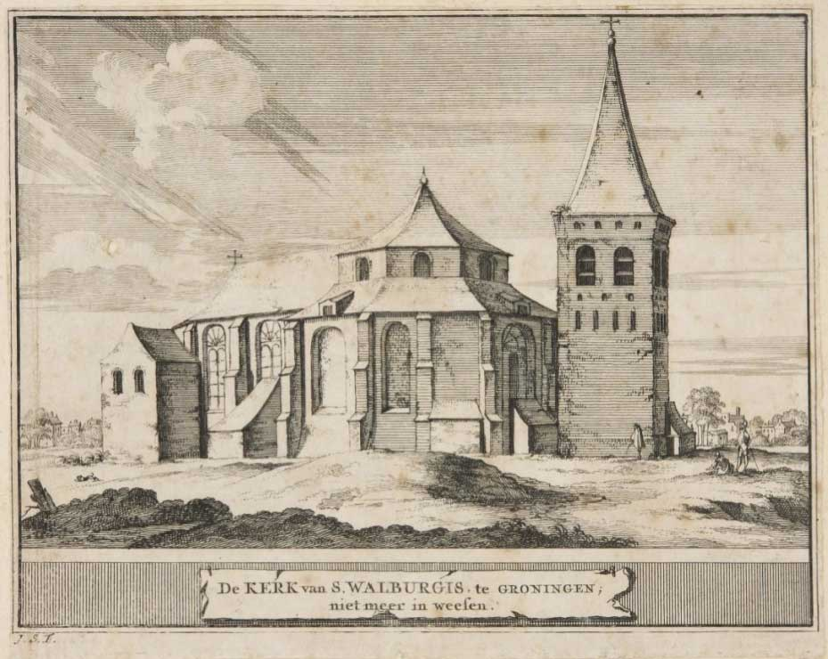 Sint Walburgis op het Martinikerkhof Groningen